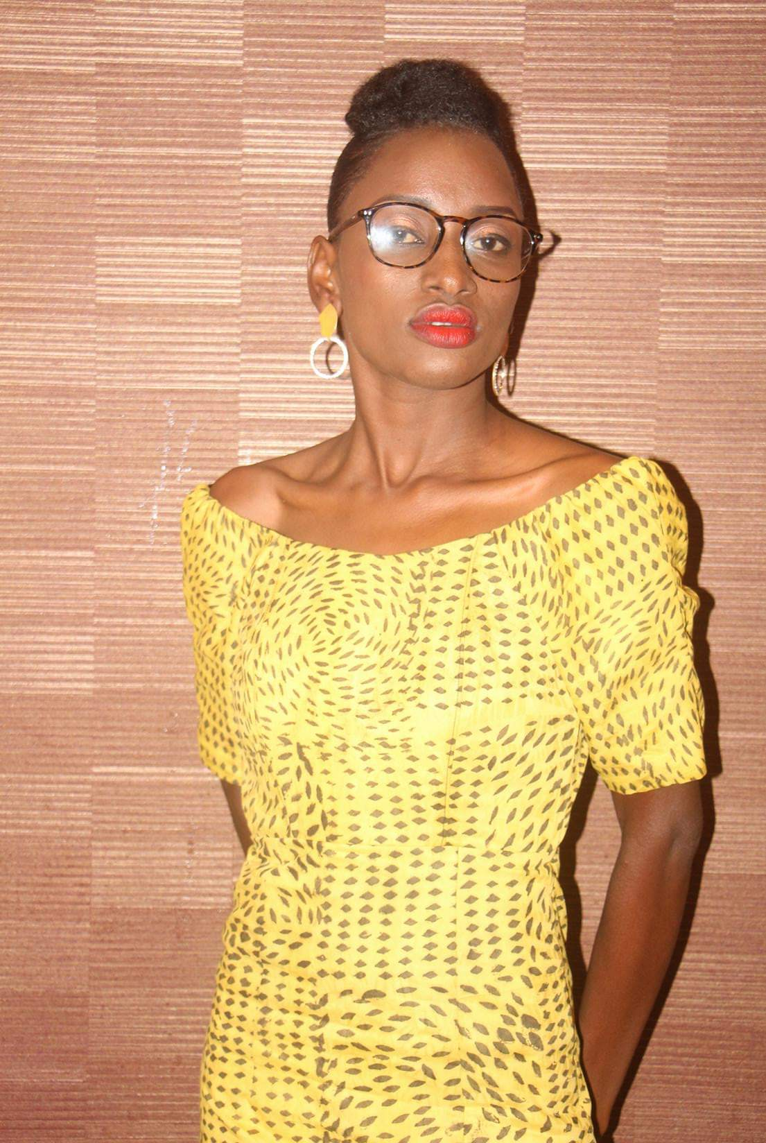 DG